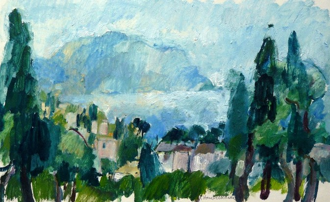 Öl auf Karton, 35 x 50 cm